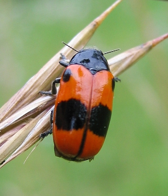 Clytra_laeviuscula, Welser Heide, Upper Austria, Austria